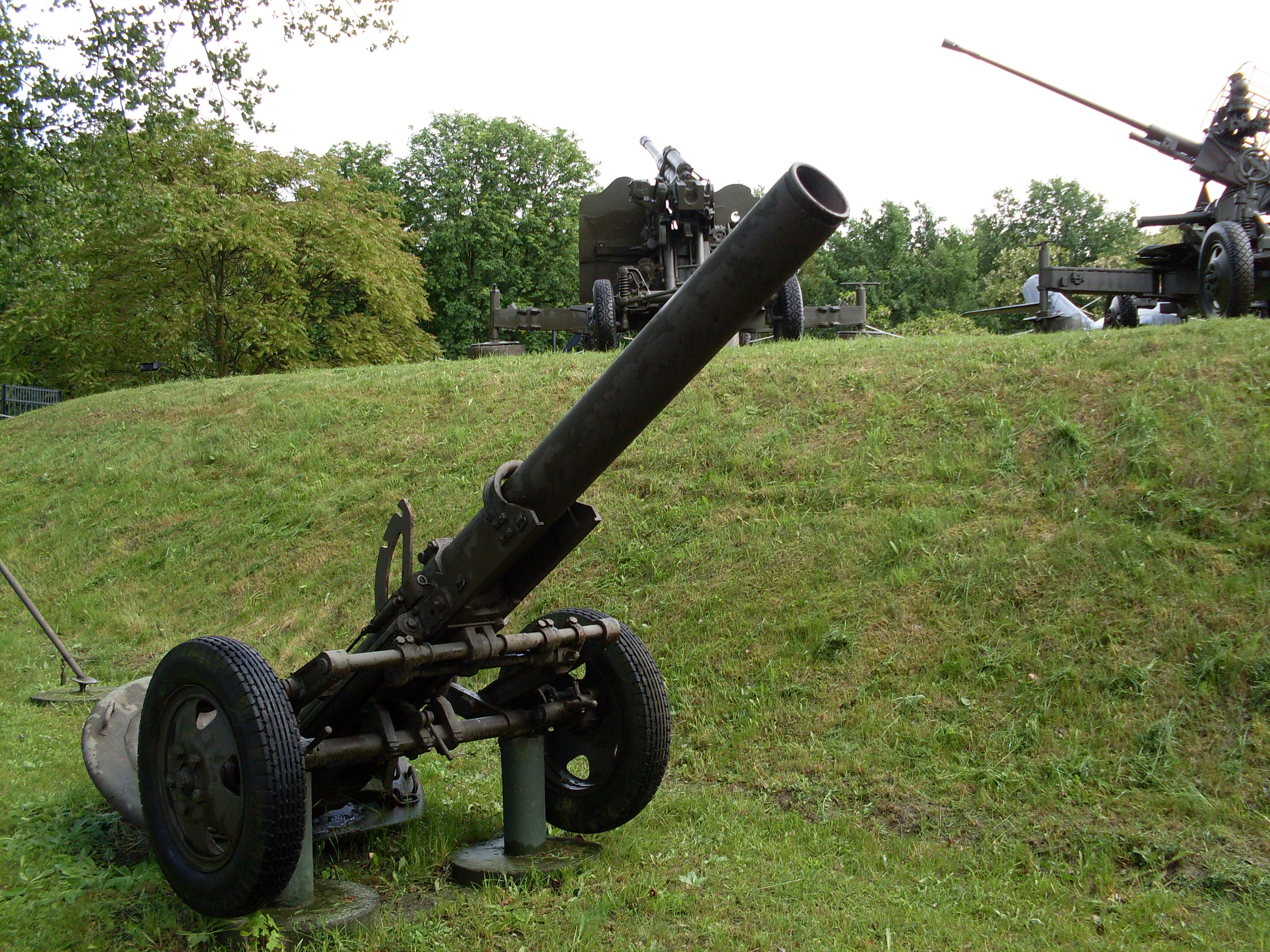 160_mm_mozdzierz_wz_1943.